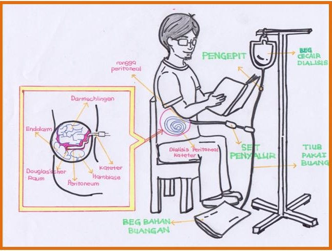 Cara penggunaan dan sambungan dialisis peritoneal